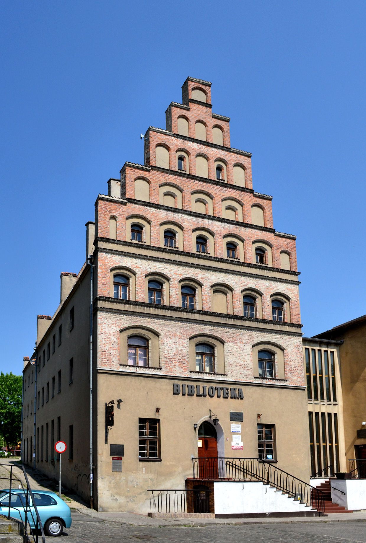 Kamienica Renesansowa (inne nazwy: kamienica Kletzinów, kamienica Klecanów, dom Rohlederów) w Stargardzie Szczecińskim